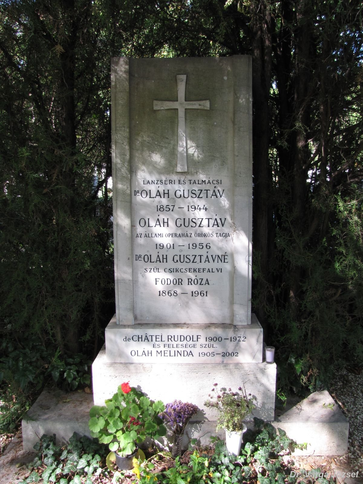 Oláh Gusztáv (Bp., 1901. aug. 20. – München, Német Szövetségi Köztársaság, 1956. dec. 19.): operai főrendező, díszlettervező sírja Budapesten. Farkasréti temető: 28-1-163/164.